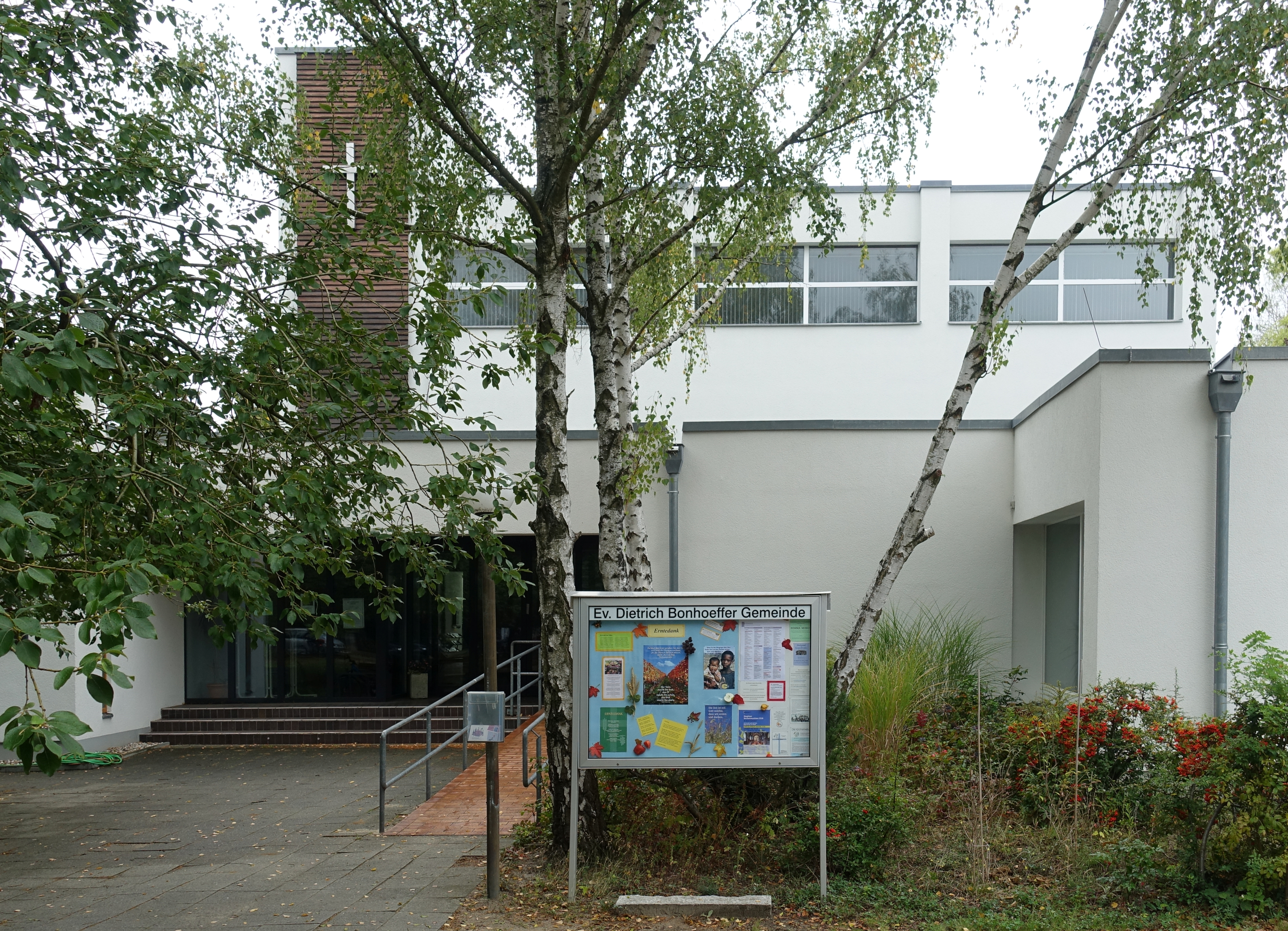 Gesamtansicht des Gemeindezentrums